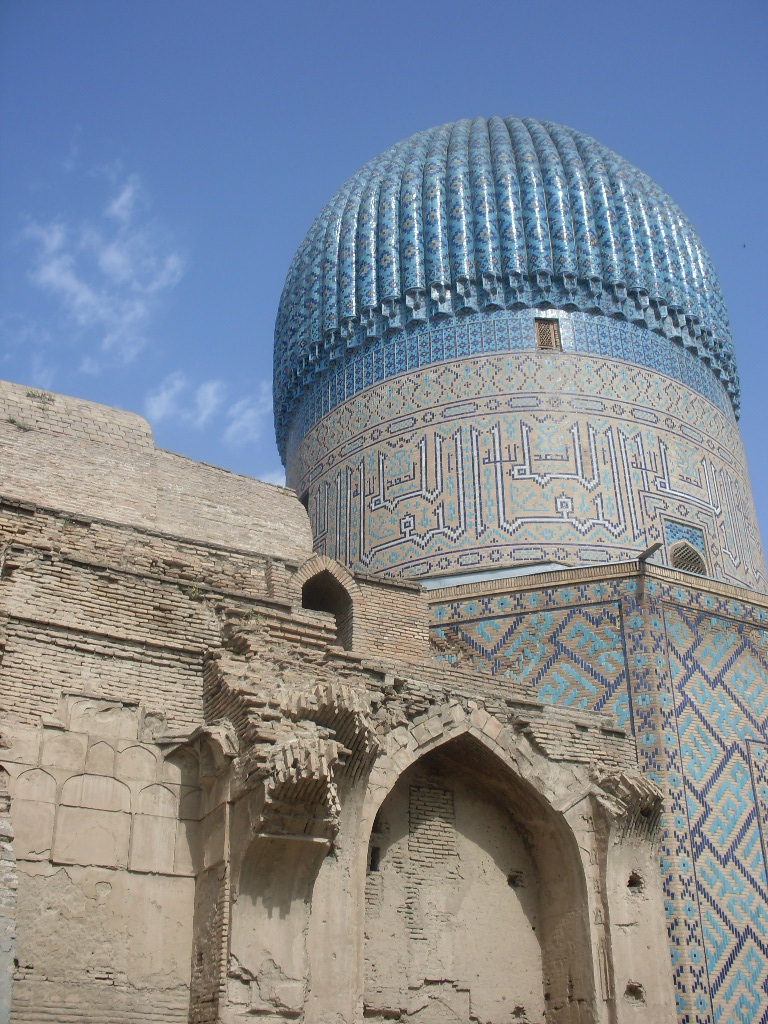 Mausoleum of Amir Temur (Gur-Emir mausoleum) мавзолей Амир Темур (мавзолей Гур-Эмир)